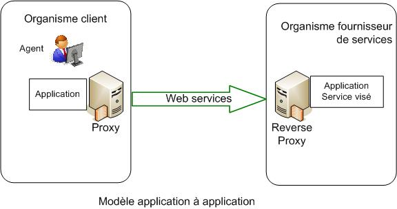 Schéma du modèle application à application